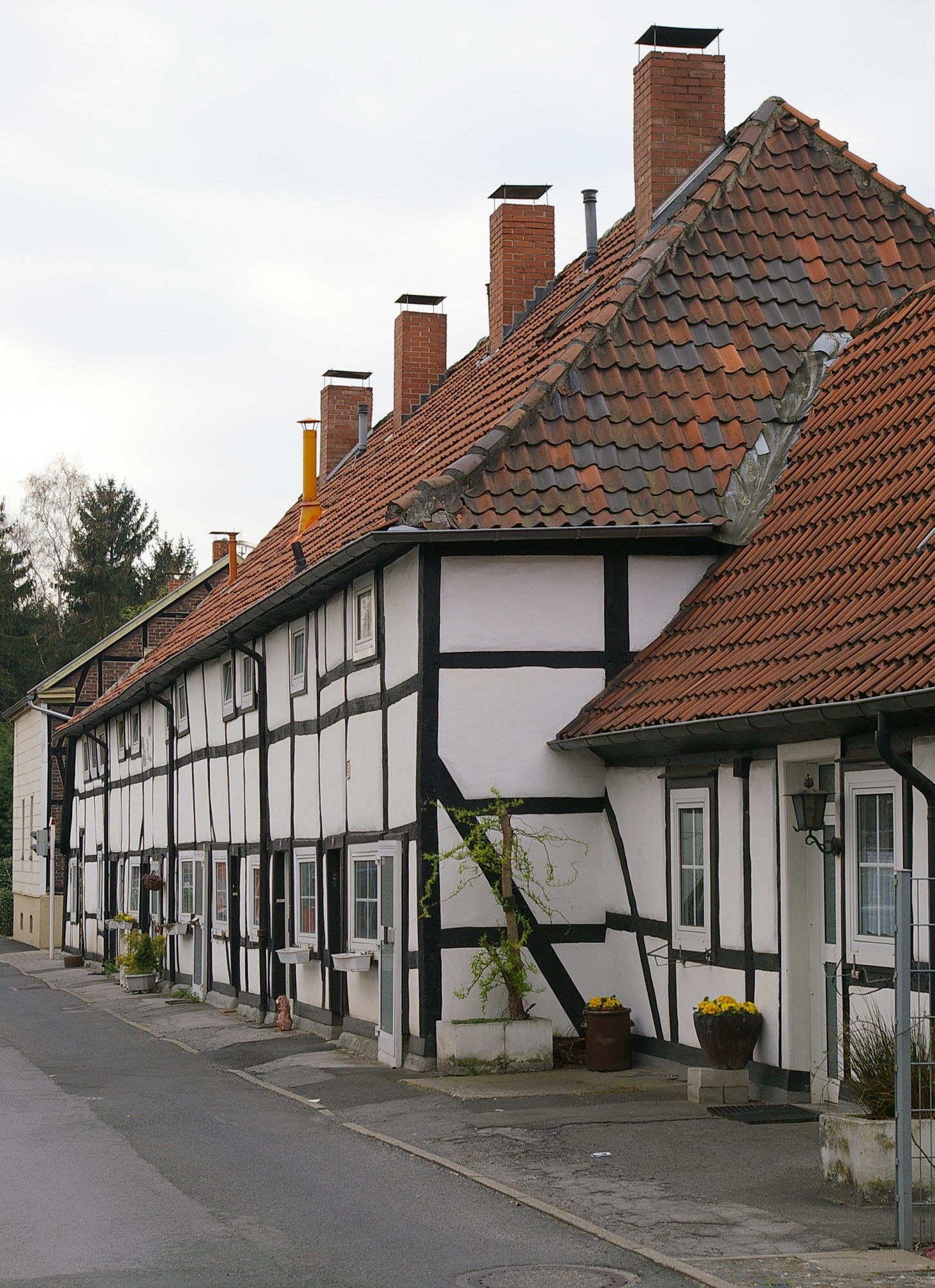 Unna, Salzsiederwohnungen der ehemaligen Saline Königsborn, sogenannte "Gademen", um 1780 erbaut